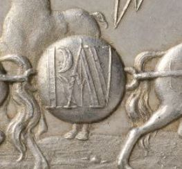 Taler, geschlossene Kugel mit R A V (Detail)